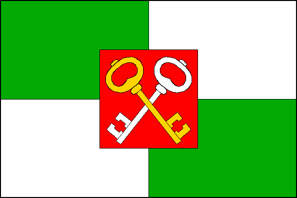 vlajka,Krásněves , okres Žďár nad Sázavou